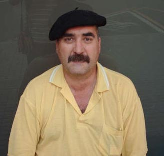 Hèctor Moret, poeta i estudiós de la llengua catalana nascut a Mequinensa (Baix Cinca)